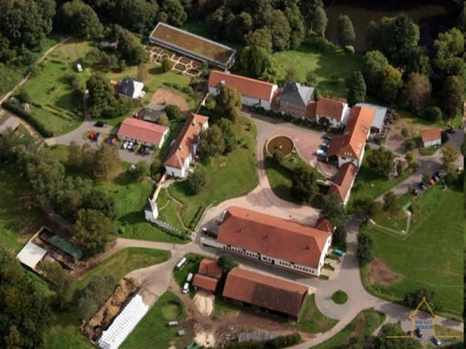 Hofgut Imsbach: Gesamtkomplex aus der Vogelperspektive